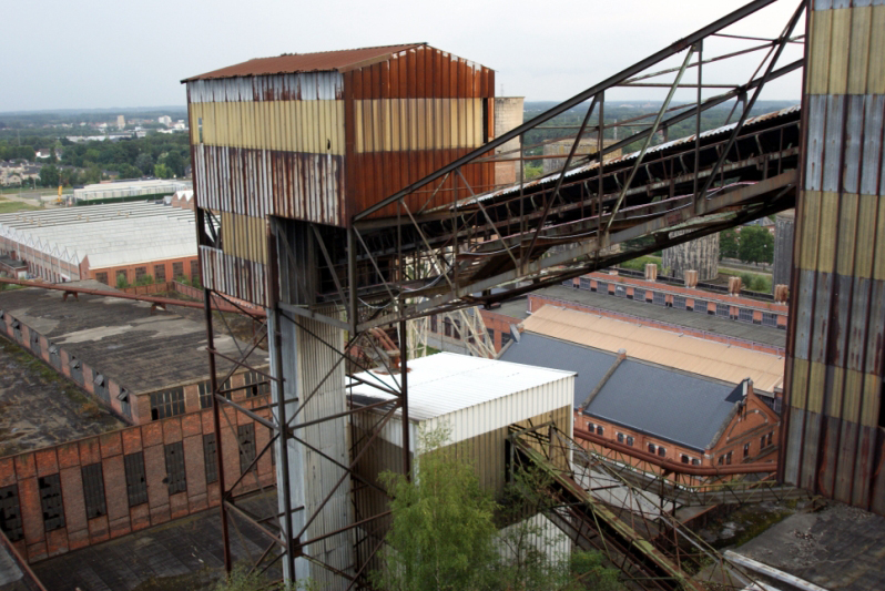 005 Beringen